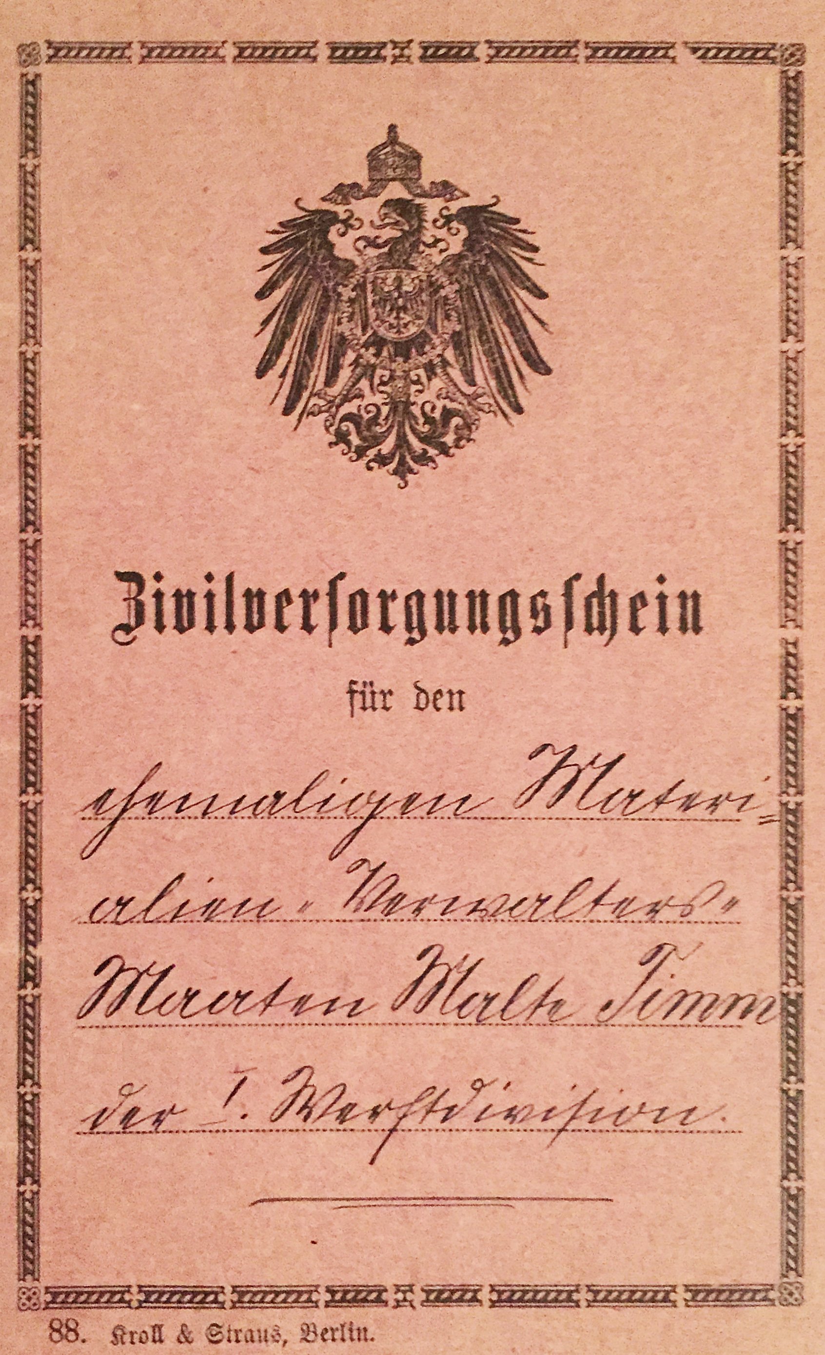 Deutsches Reich - Zivilversorgungsschein von 1905